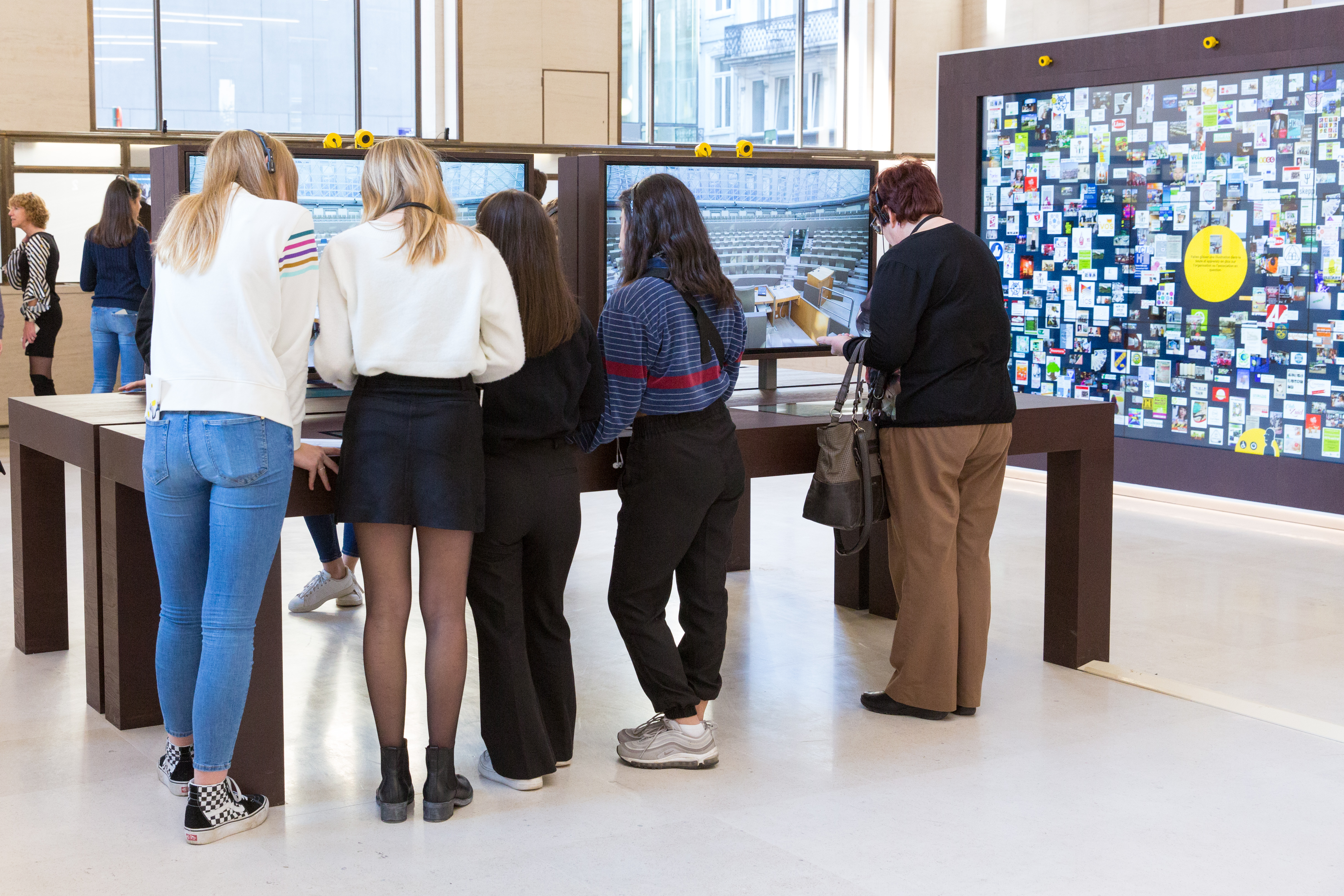 Jongeren leren meer over de structuur en opbouw van het Vlaams Parlement